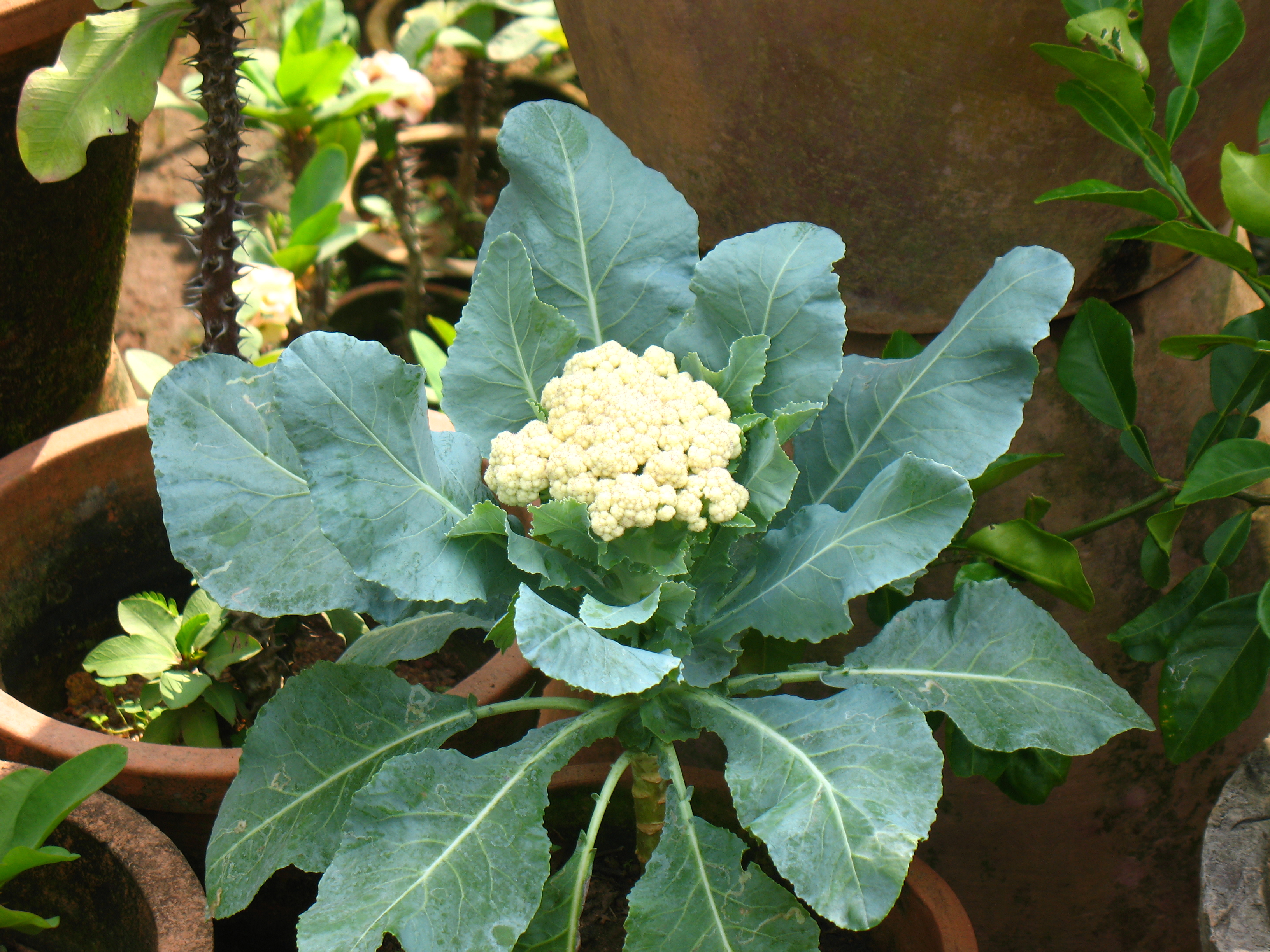 കോളിഫ്ലവർ ചെടിയും ബഡും (പൂവ്)